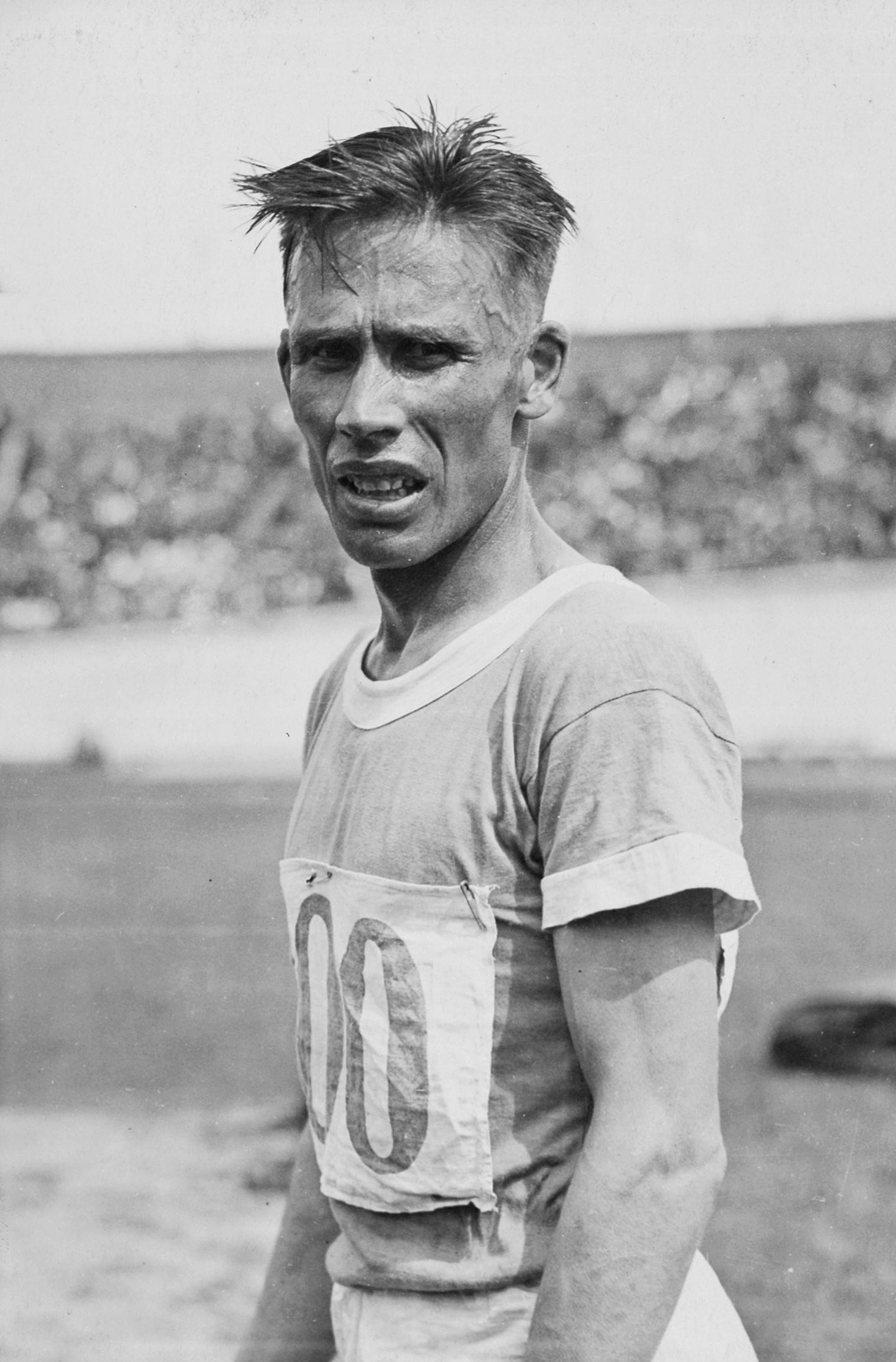 Sport. Sport, Olympische Spelen Amsterdam, 1928 : Ville Ritola, winnaar van de 5000 m hardlopen.